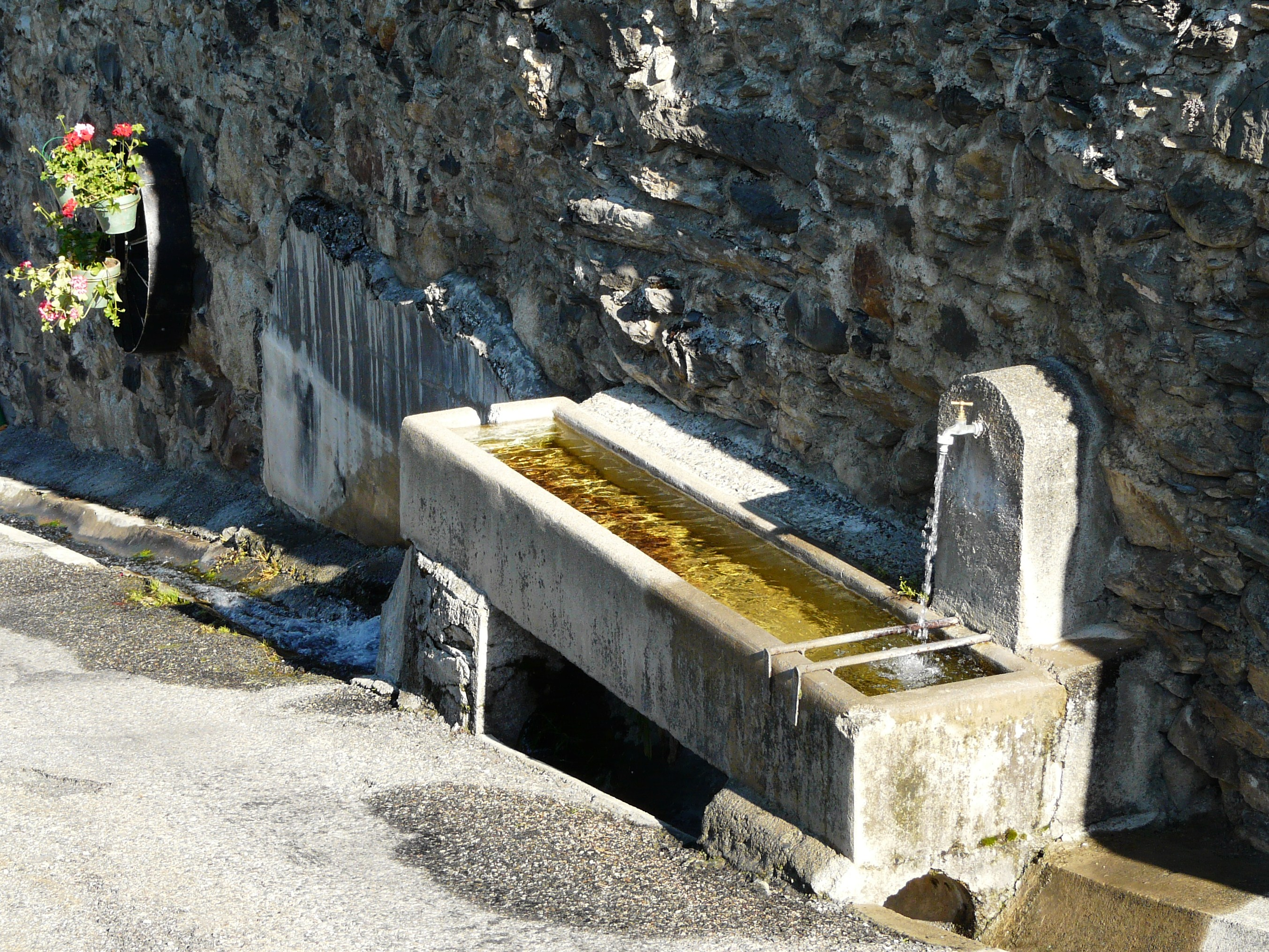 Fontaine—abreuvoir à Saint-Aventin, Haute-Garonne, France.